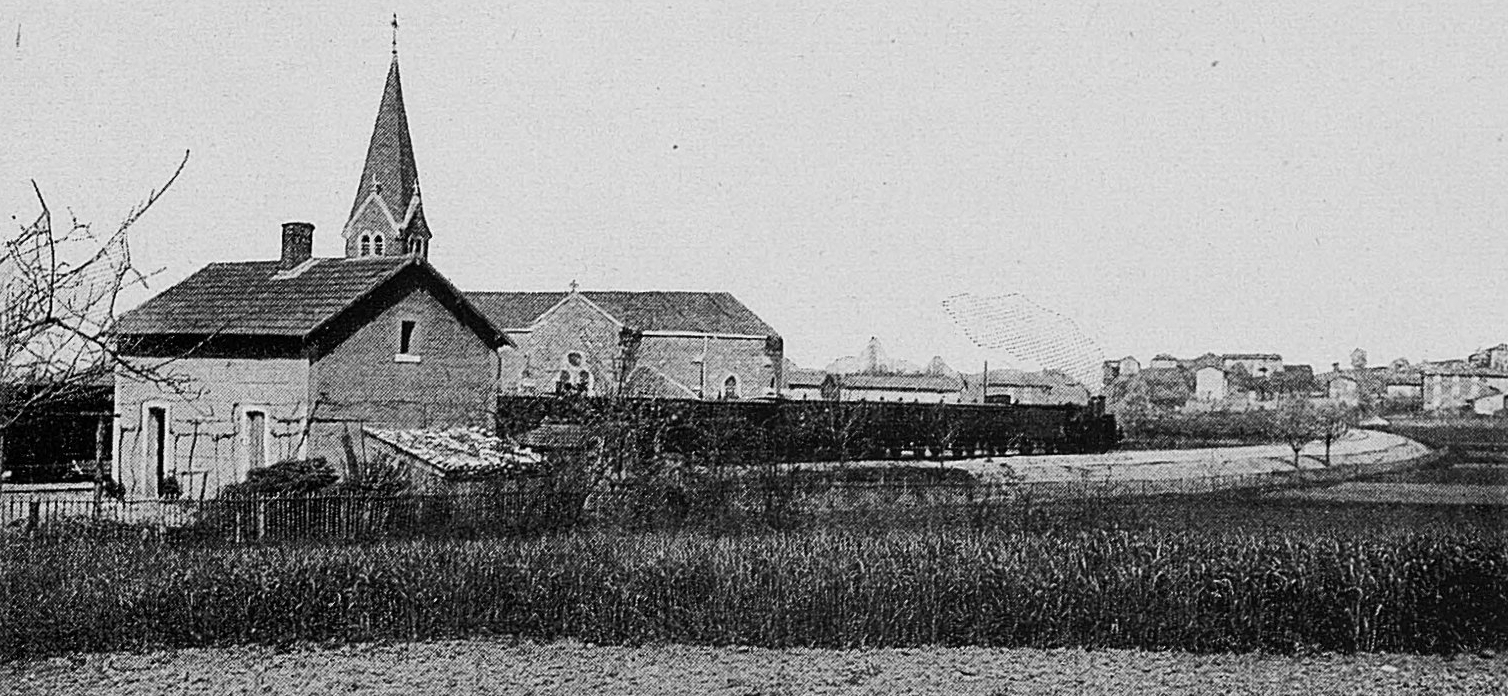 Dictionnaire illustré des communes du département du Rhône. Tome 1 / par MM. E. de Rolland et D. Clouzet.